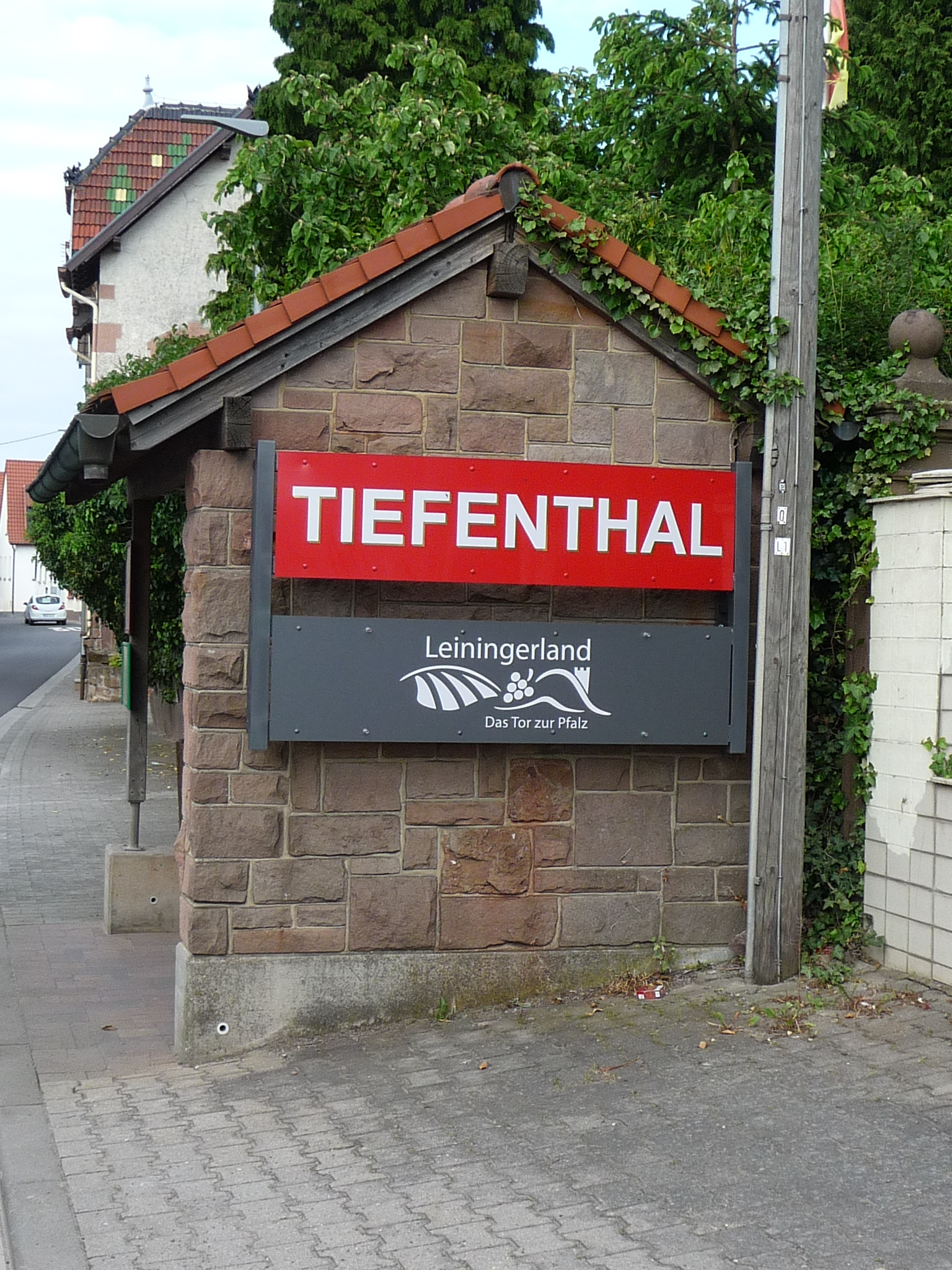 Tiefenthal ist eine Ortsgemeinde im Landkreis Bad Dürkheim in Rheinland-Pfalz. Sie gehört der Verbandsgemeinde Hettenleidelheim an.